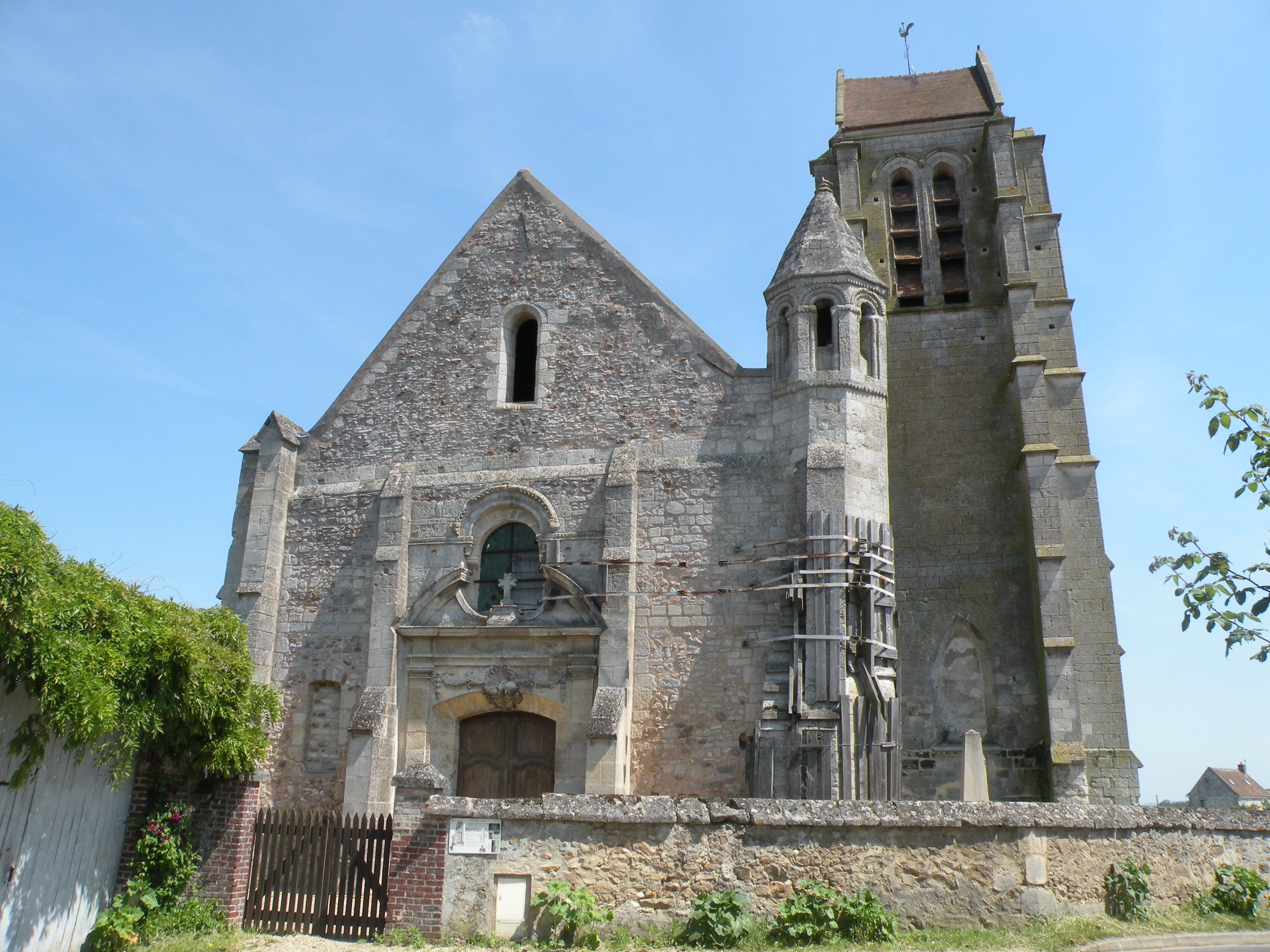 Église Notre-Dame-de-l'Assomption d'Haravilliers